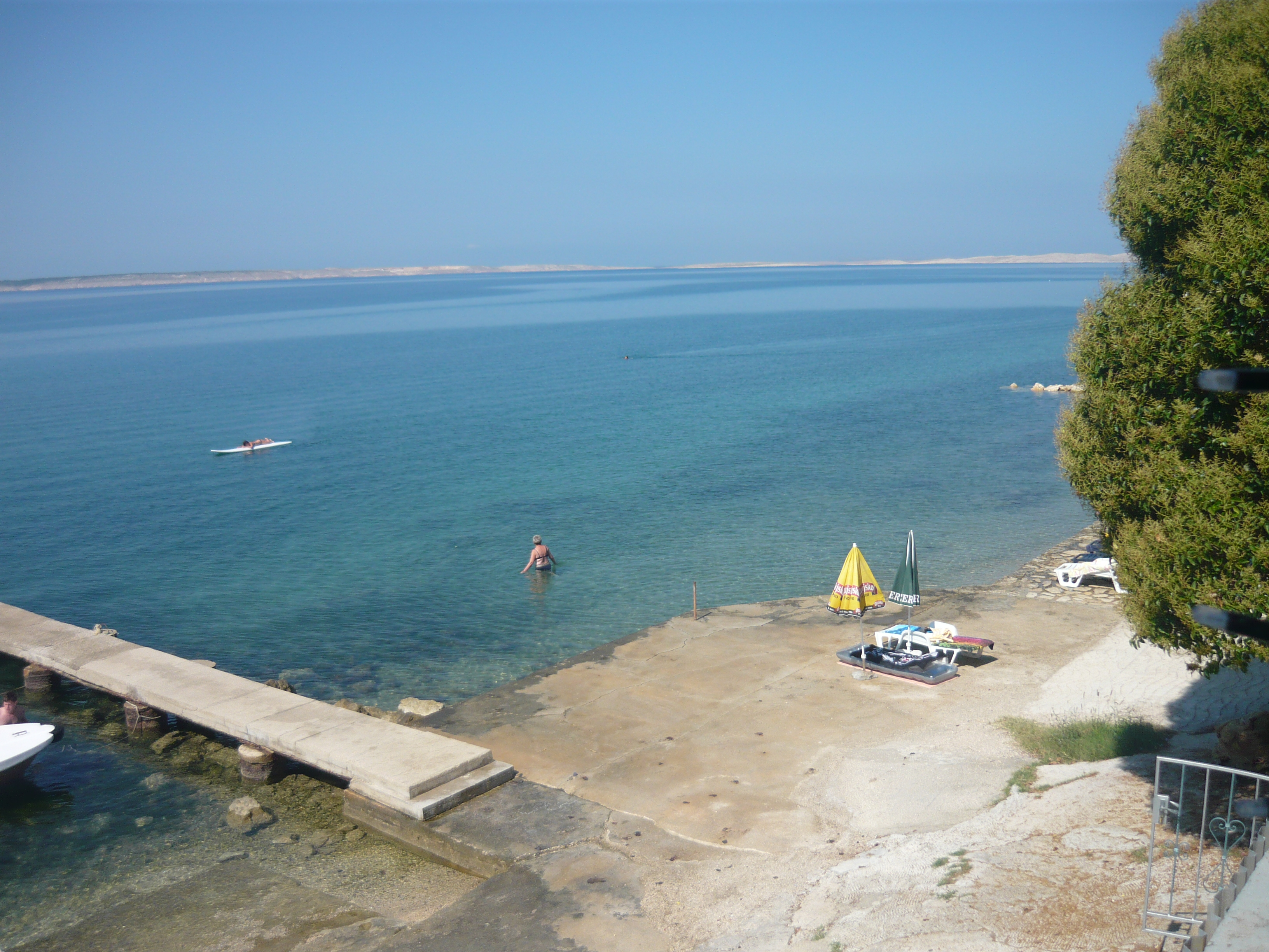 Bootsteg Rtina Kroatien Hotel Stosic